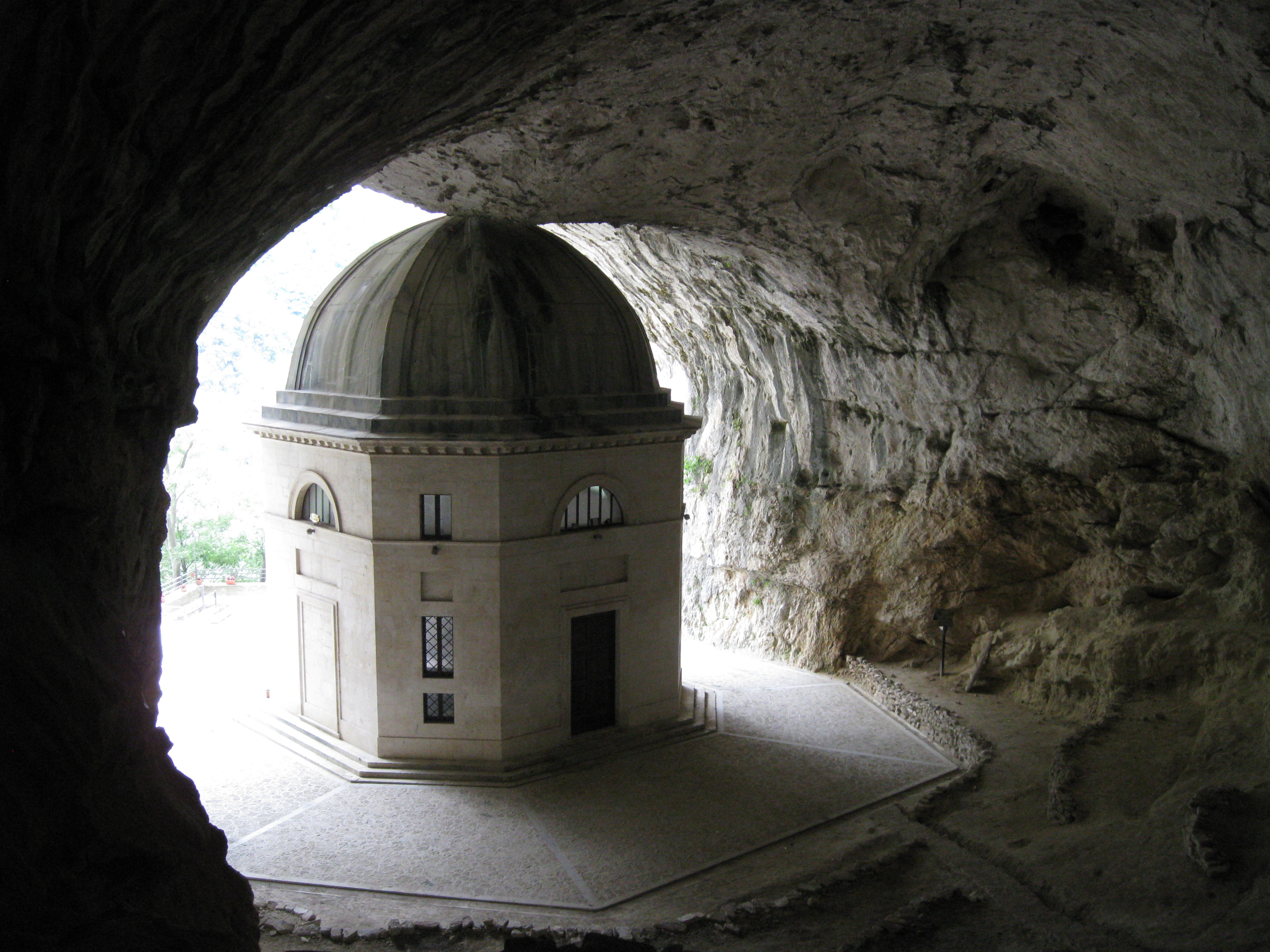 Tempio neoclassico, detto del Valadier, Genga, Italien